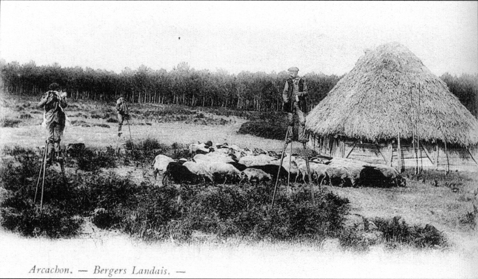 Bergers landais près du Bassin d'Arcachon, en Pays de Buch, à la fin du XIXe siècle. Copyright Catégorie:Landes de Gascogne Catégorie:Pays de Buch